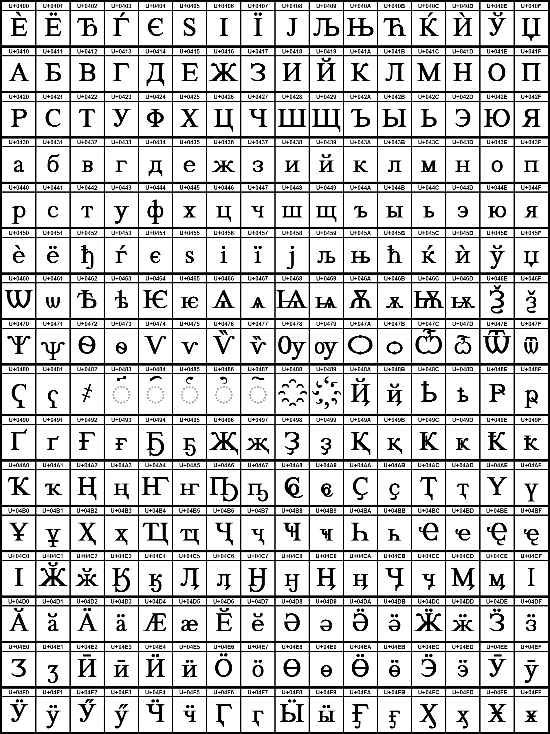 Grafiktafel für den Unicodeblock Kyrillisch.